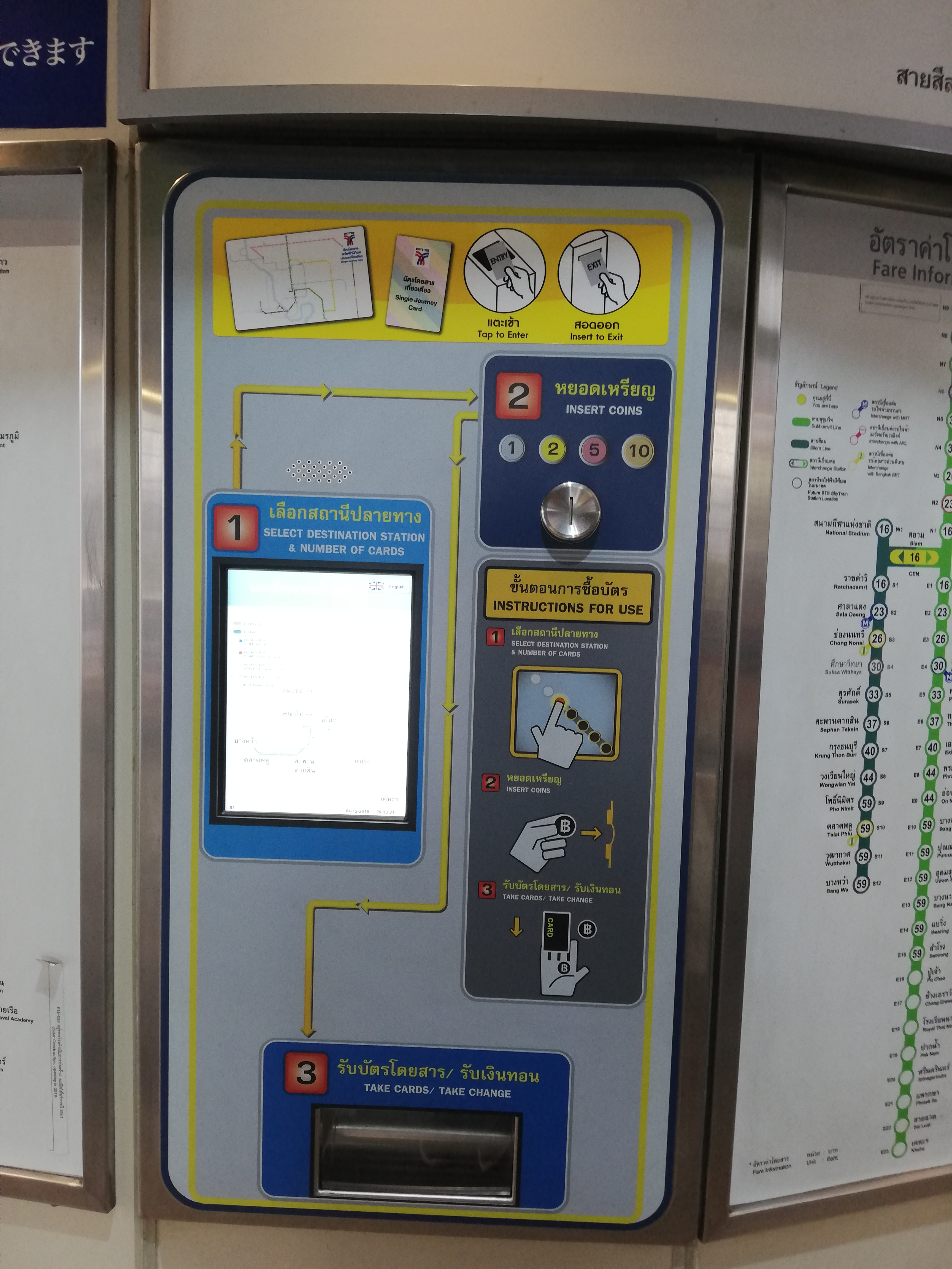 เครื่องจำหน่ายตั๋วรถไฟฟ้าบีทีเอสรุ่นใหม่